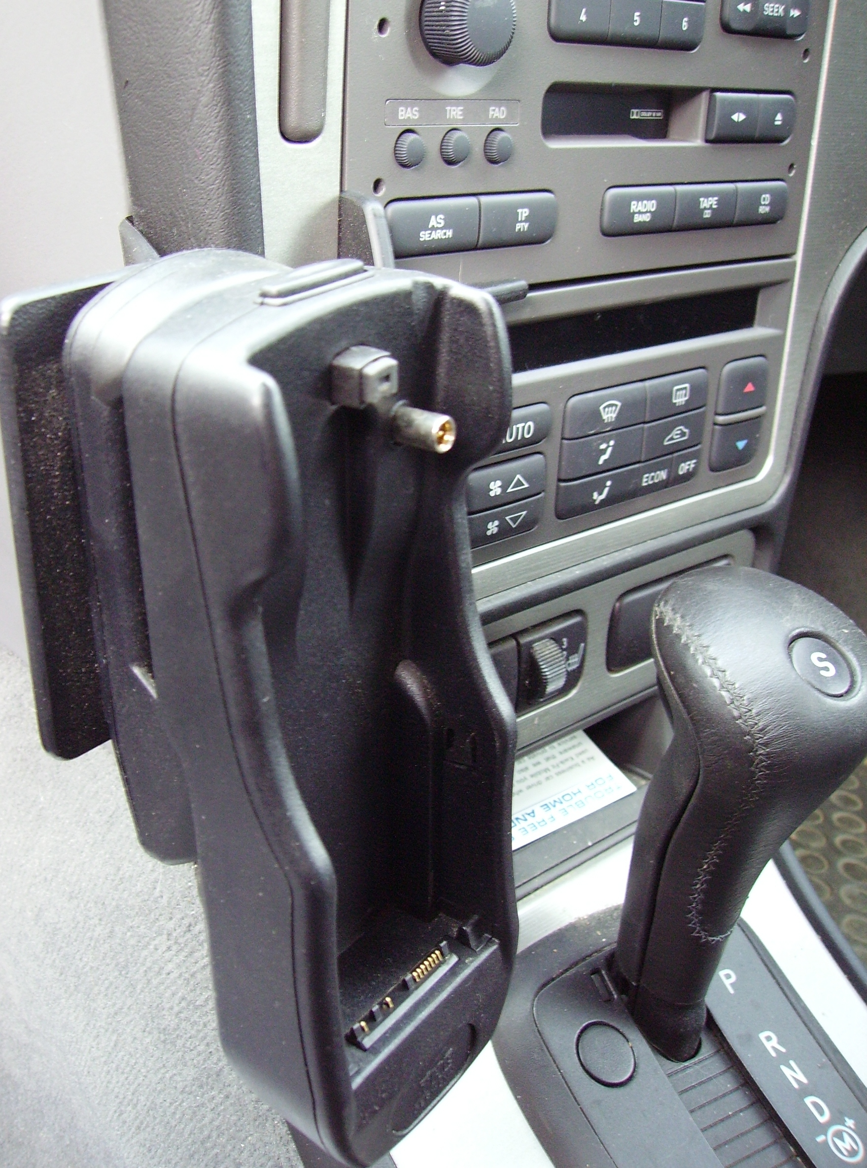 Hands-free kit (Saab 9-5)